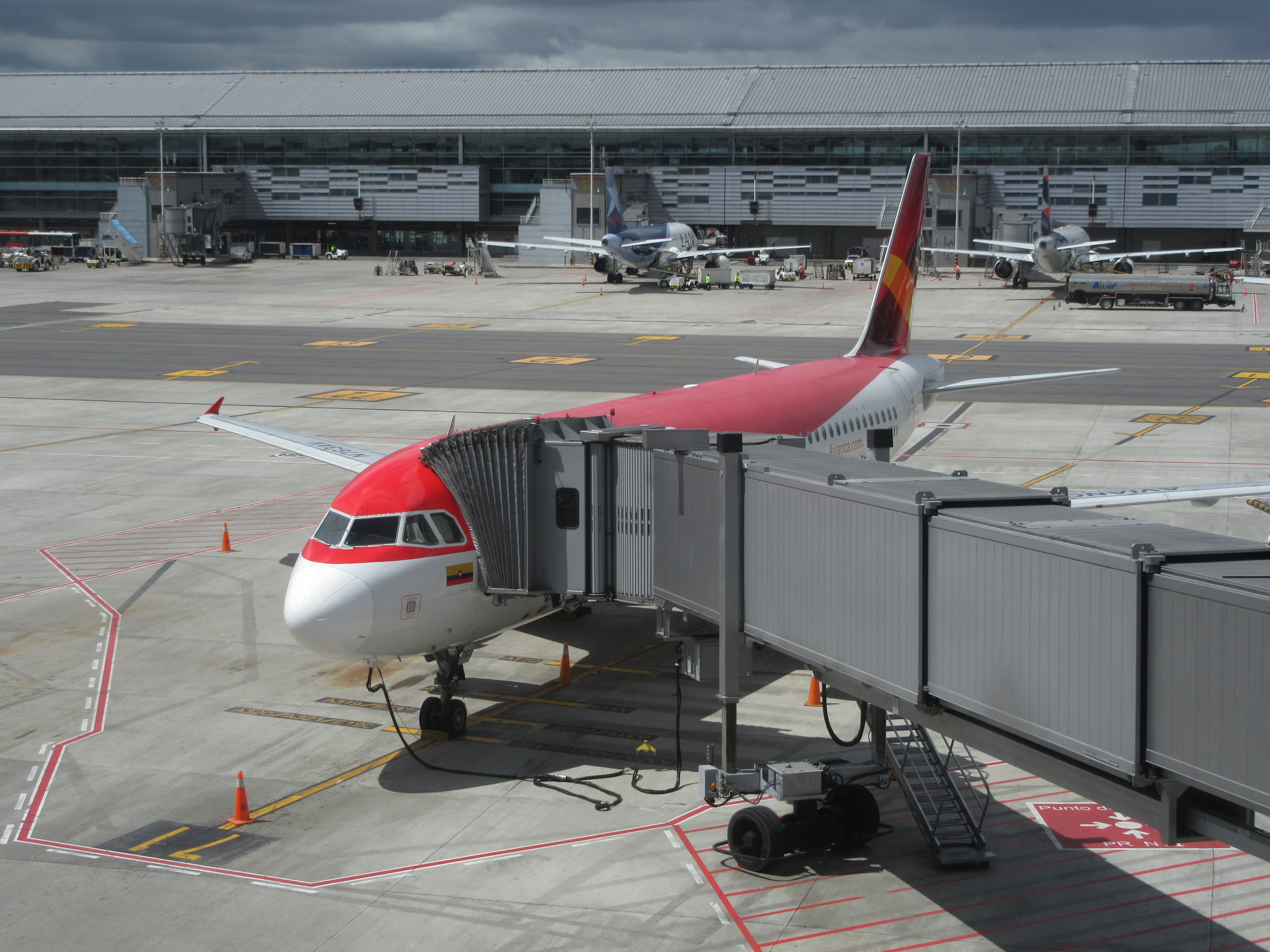 Airbus N763AV conectado a pasarela de acceso en el aeropuerto El Dorado de Bogotá.